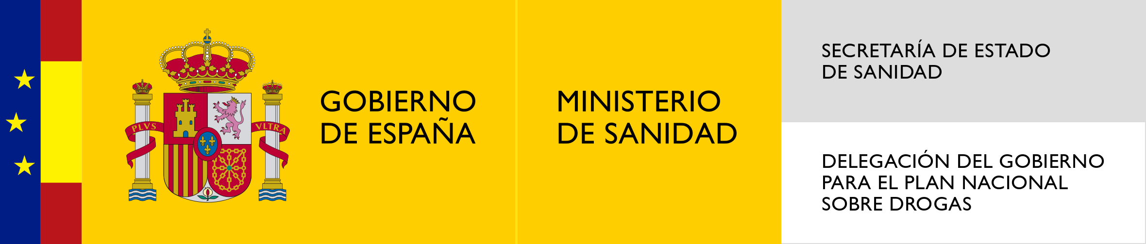 Logotipo de la Delegación del Gobierno para el Plan Nacional sobre Drogas